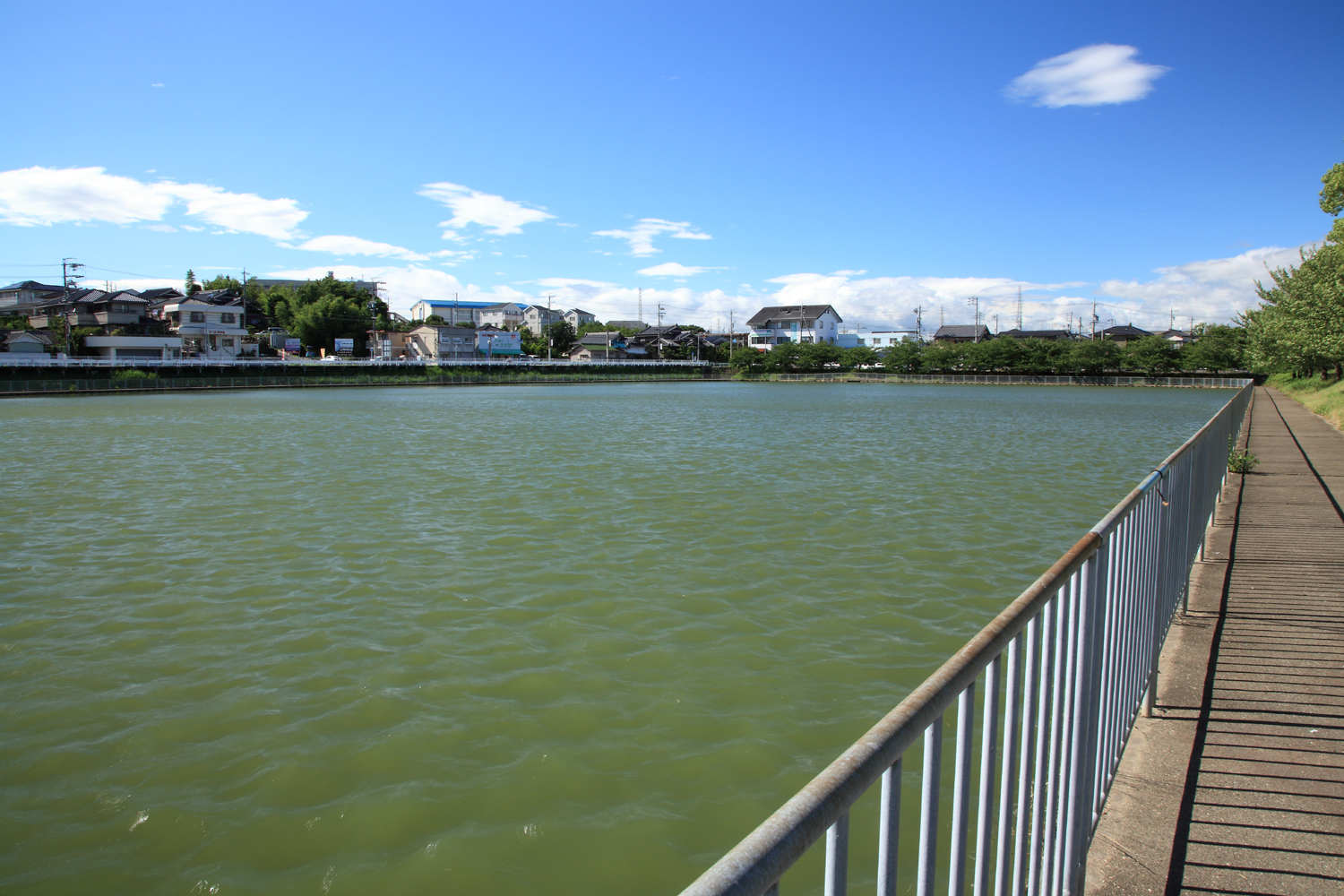 大池（名古屋市緑区、2012年）